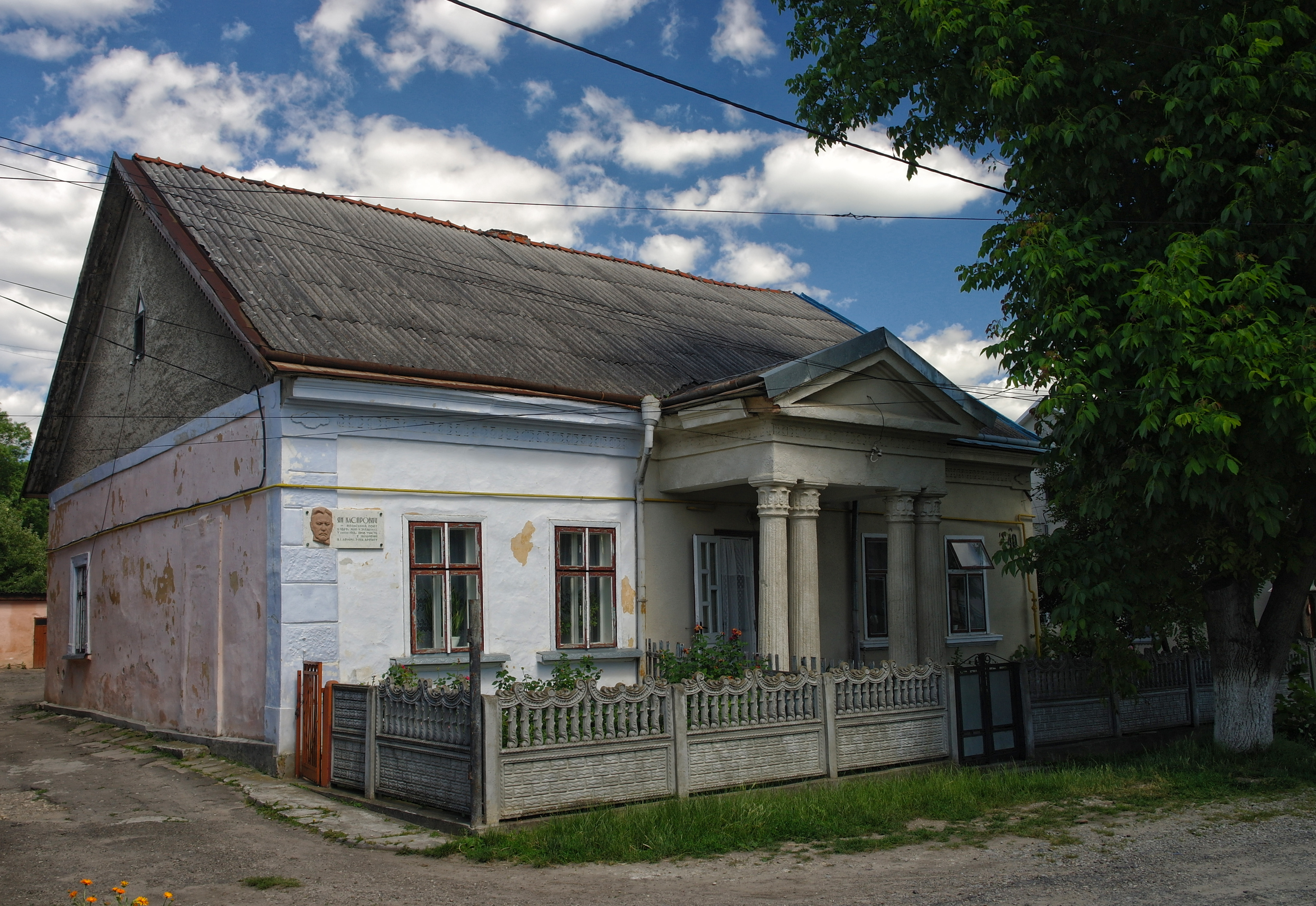 Заліщики, Житловий будинок, в якому жив польський письменник, освітянин Ян Каспрович